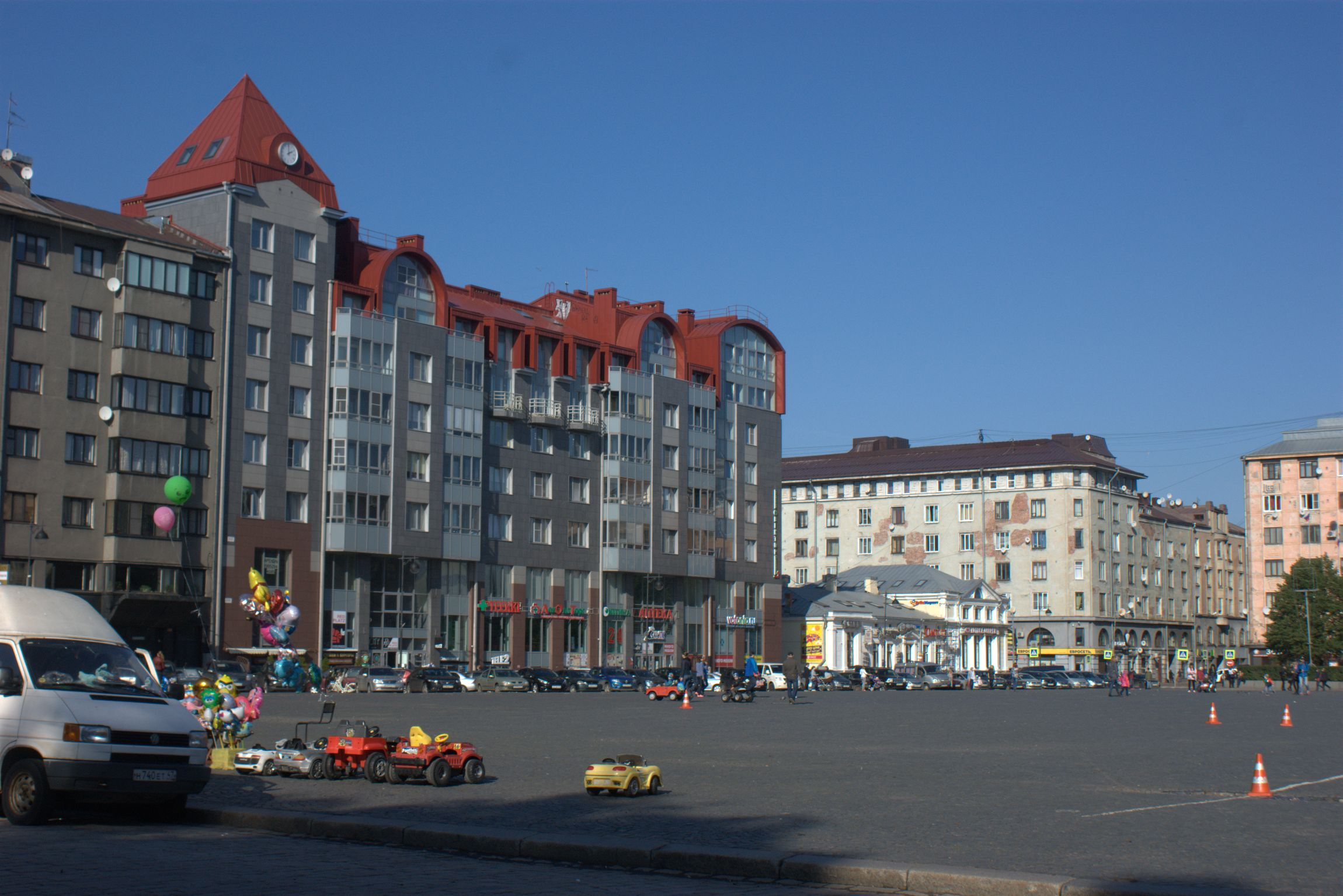 Жилой дом с магазинами: Северная улица, 8, улица Ушакова, 8, Выборг, Выборгский район, Ленинградская область